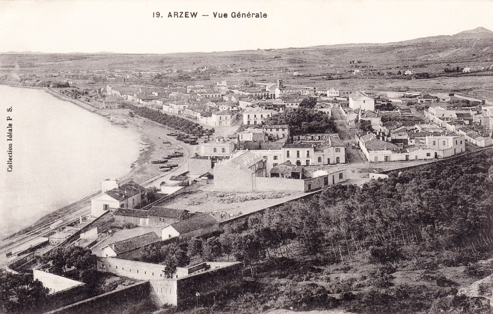 Arzew (Algérie), vers 1905